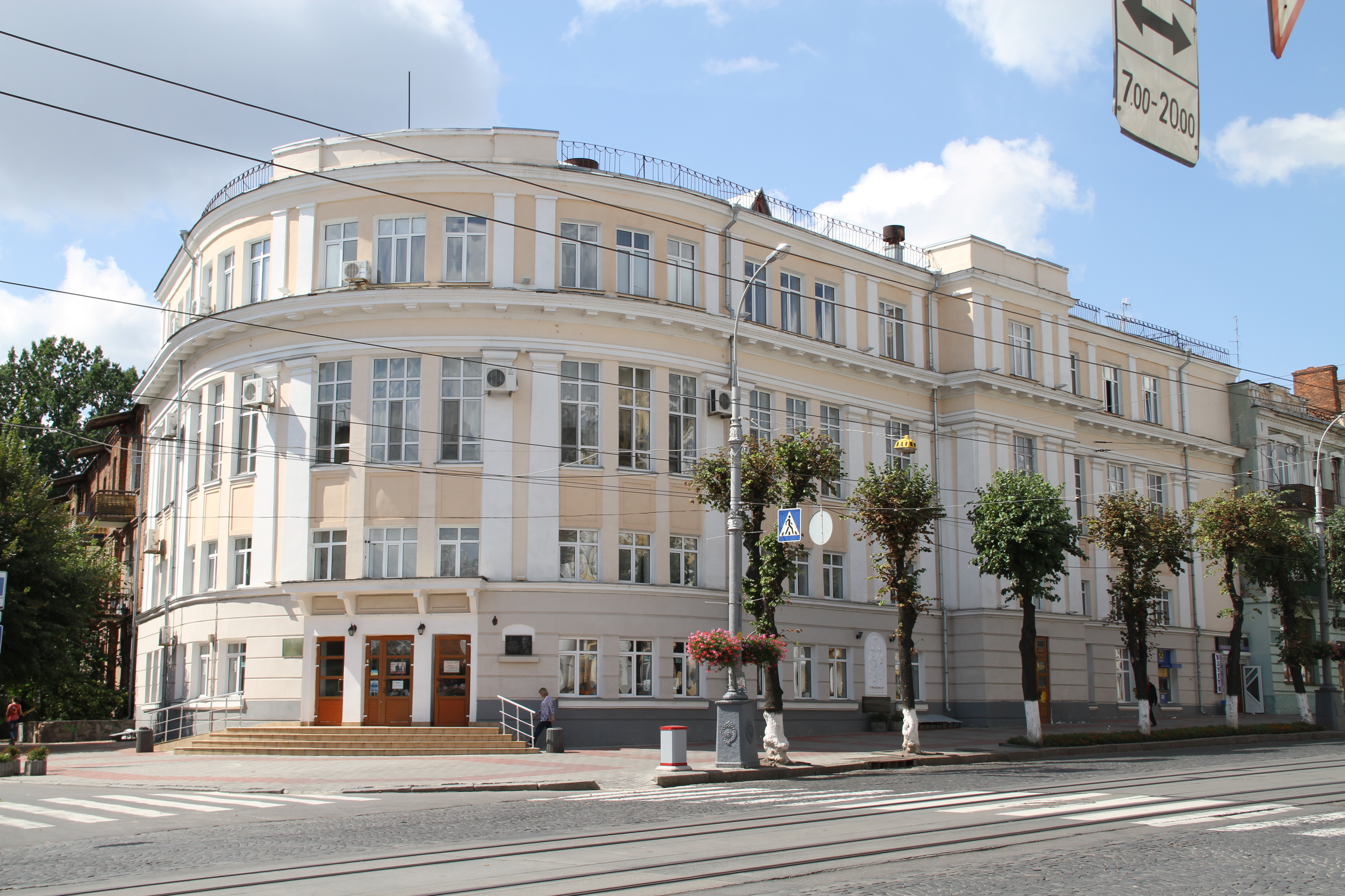 Библиотека им. Тимирязева